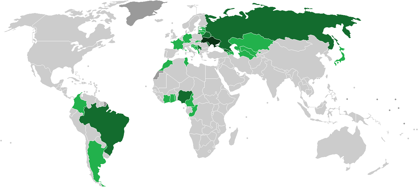 Мапа, що показує громадянство гравців ФК Зоря Луганськ. Темно-зеленим позначено країни звідки походить щонайменше 5 гравців, які у різний час виступали за клуб; світло-зеленим - країни звідки походить менше 5 гравців